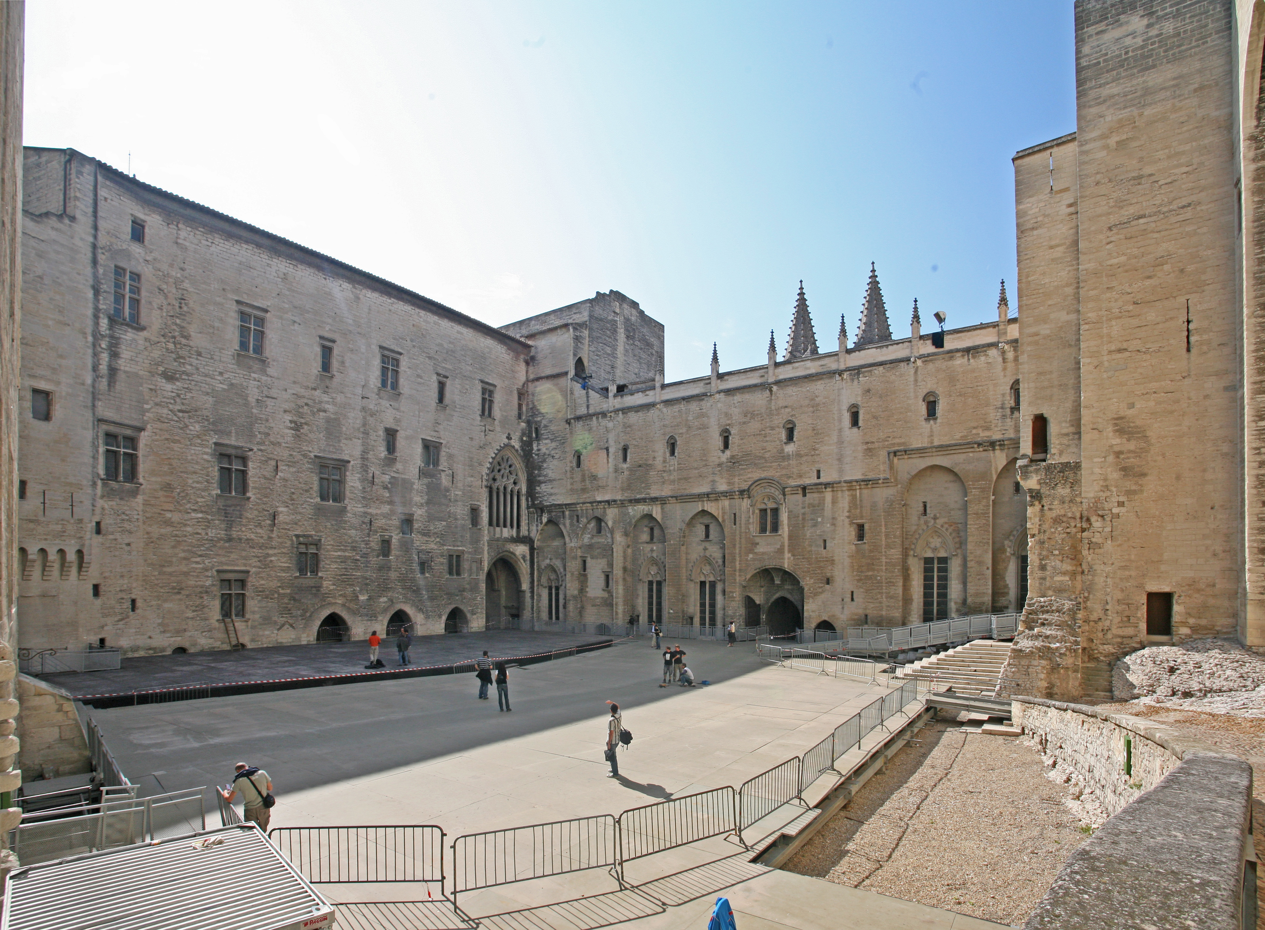 Cour d'honneur du Palais des Papes, Avignon, Vaucluse, France